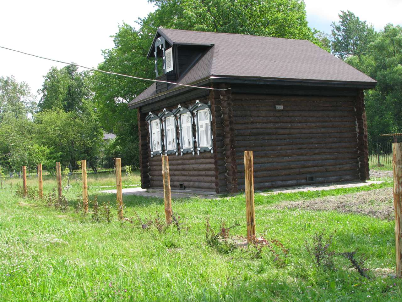 "Матрёнин двор" возле Мезиновской средней школы